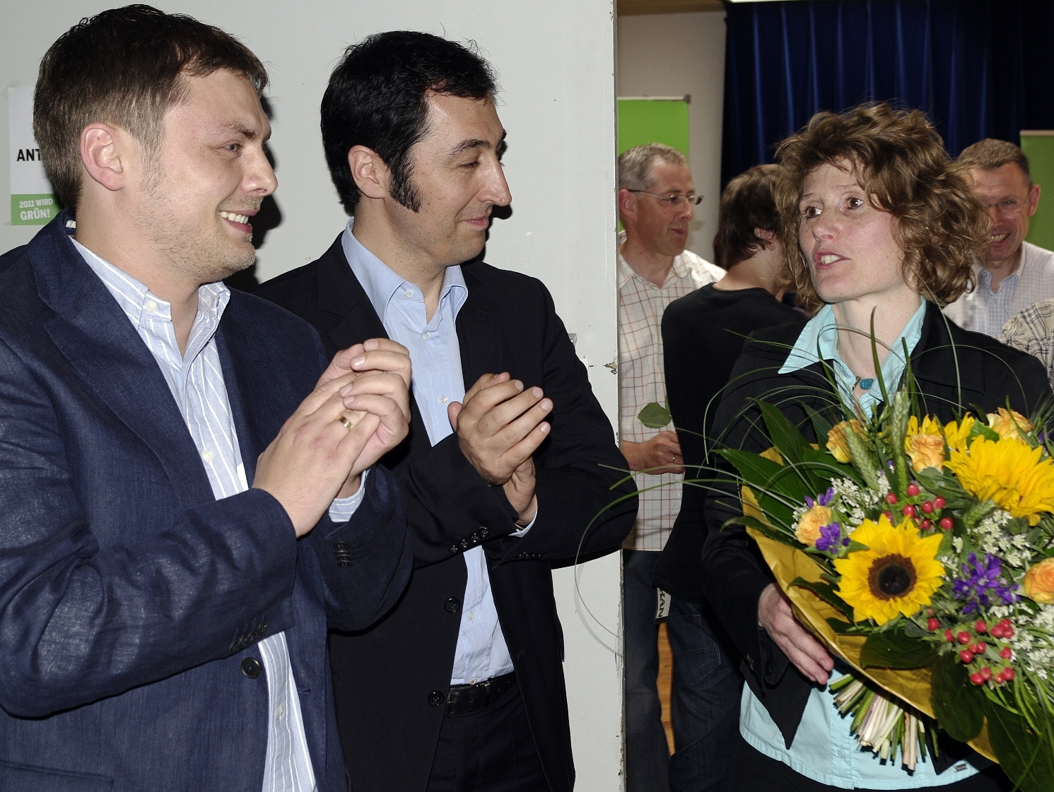 Eveline Lemke kurz nach ihrer Wahl zur Spitzenkandidatin von Bündnis 90/Die Grünen Rheinland-Pfalz für die Landtagswahl 2011 - zusammen mit Cem Özdemir (Mitte) und Daniel Köbler (links)